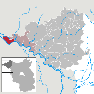 Lenzerwische in Brandenburg (Country) - District Prignitz